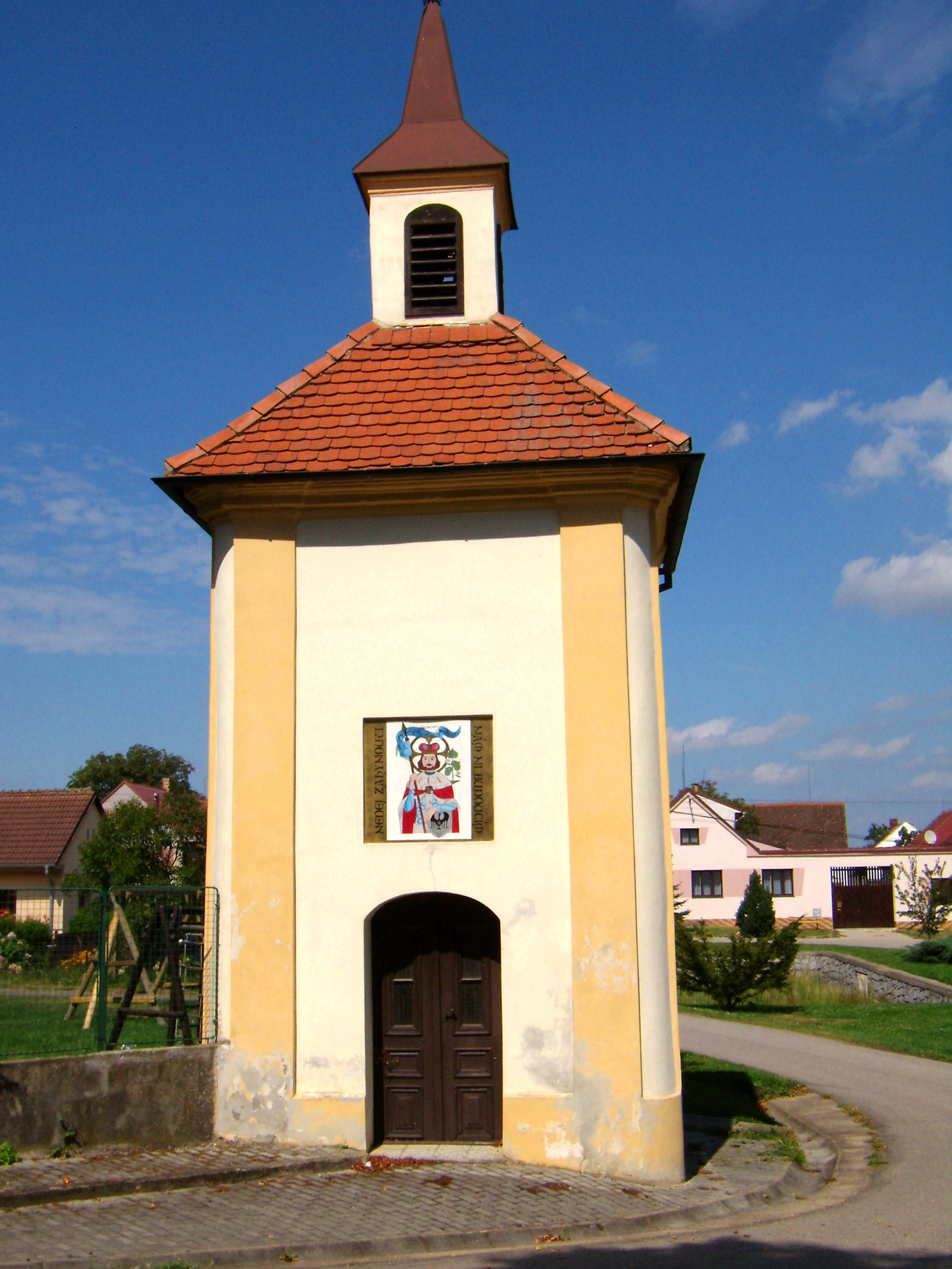 Drahotěšice - kaple svatého Václava